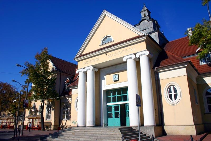 Grodzisk Mazowiecki in Poland